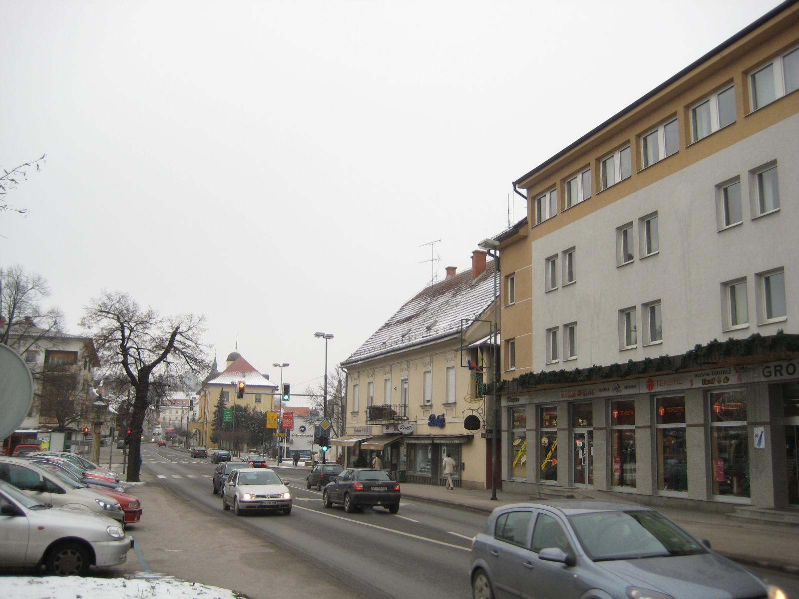 Gornja Radgona, town in Slovenia